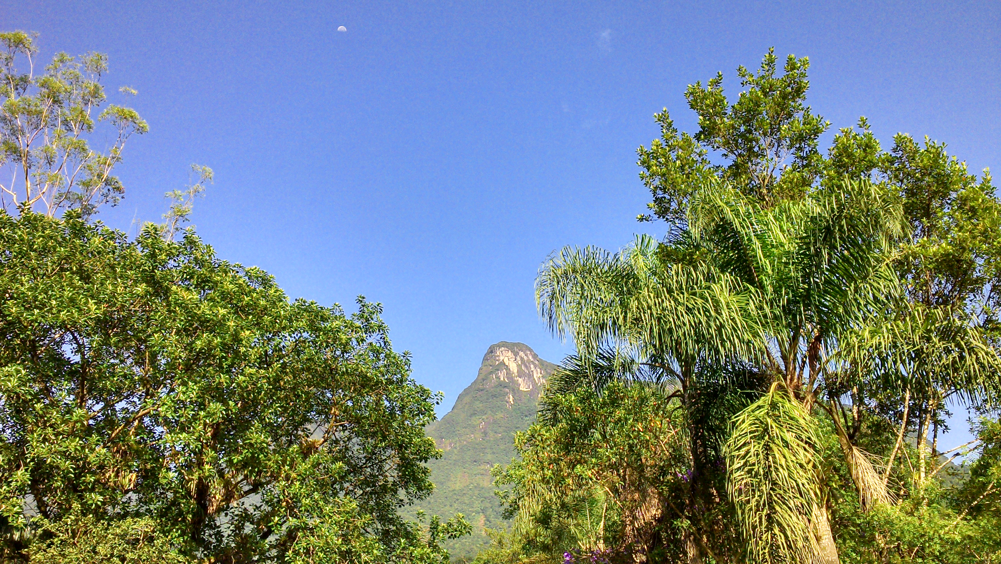 Foto da Serra do Mar - Fotografada no Recanto Mãe Catira - Estrada da Graciosa